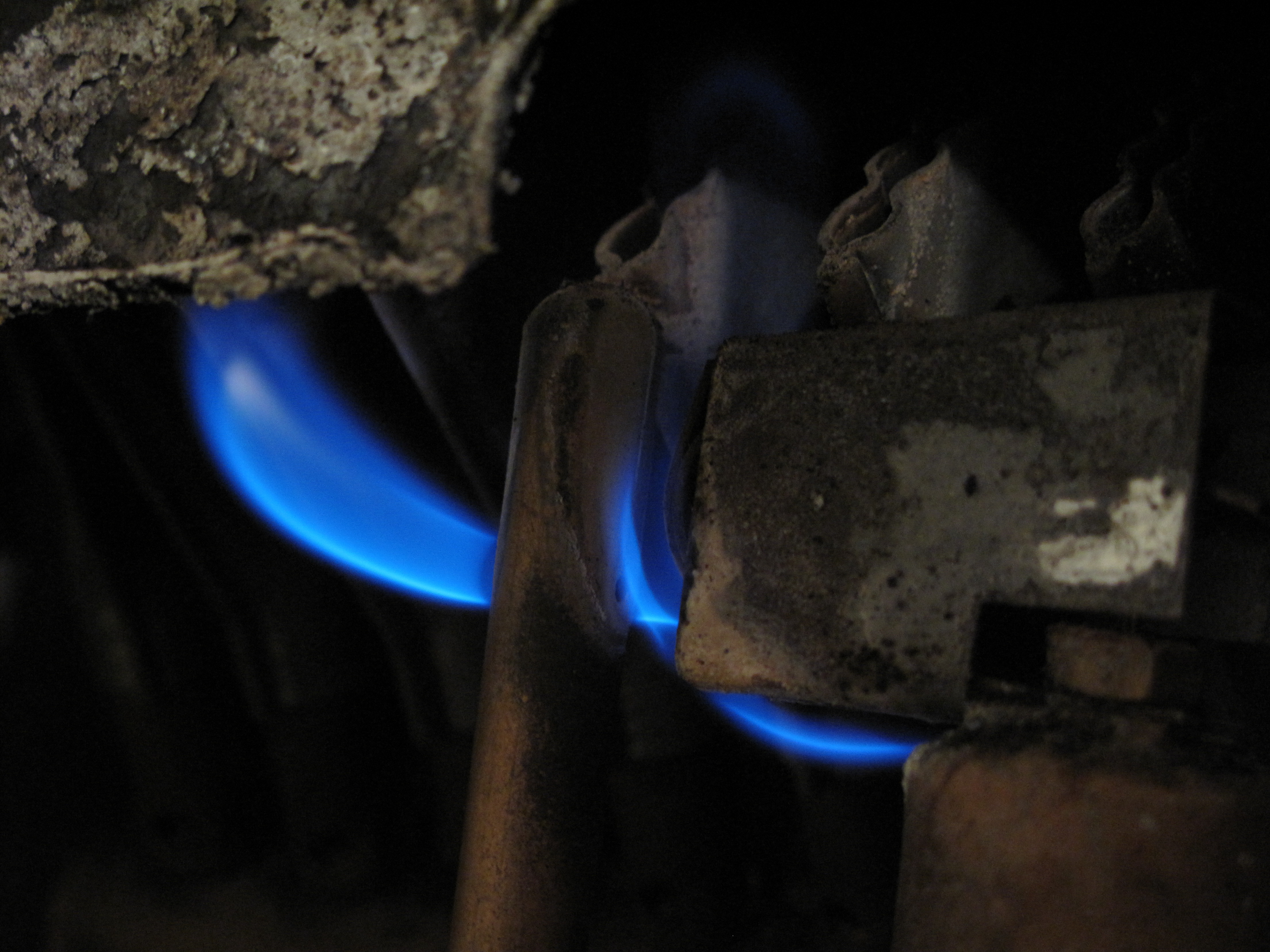 Karma Mora typ PO 35 a její části.